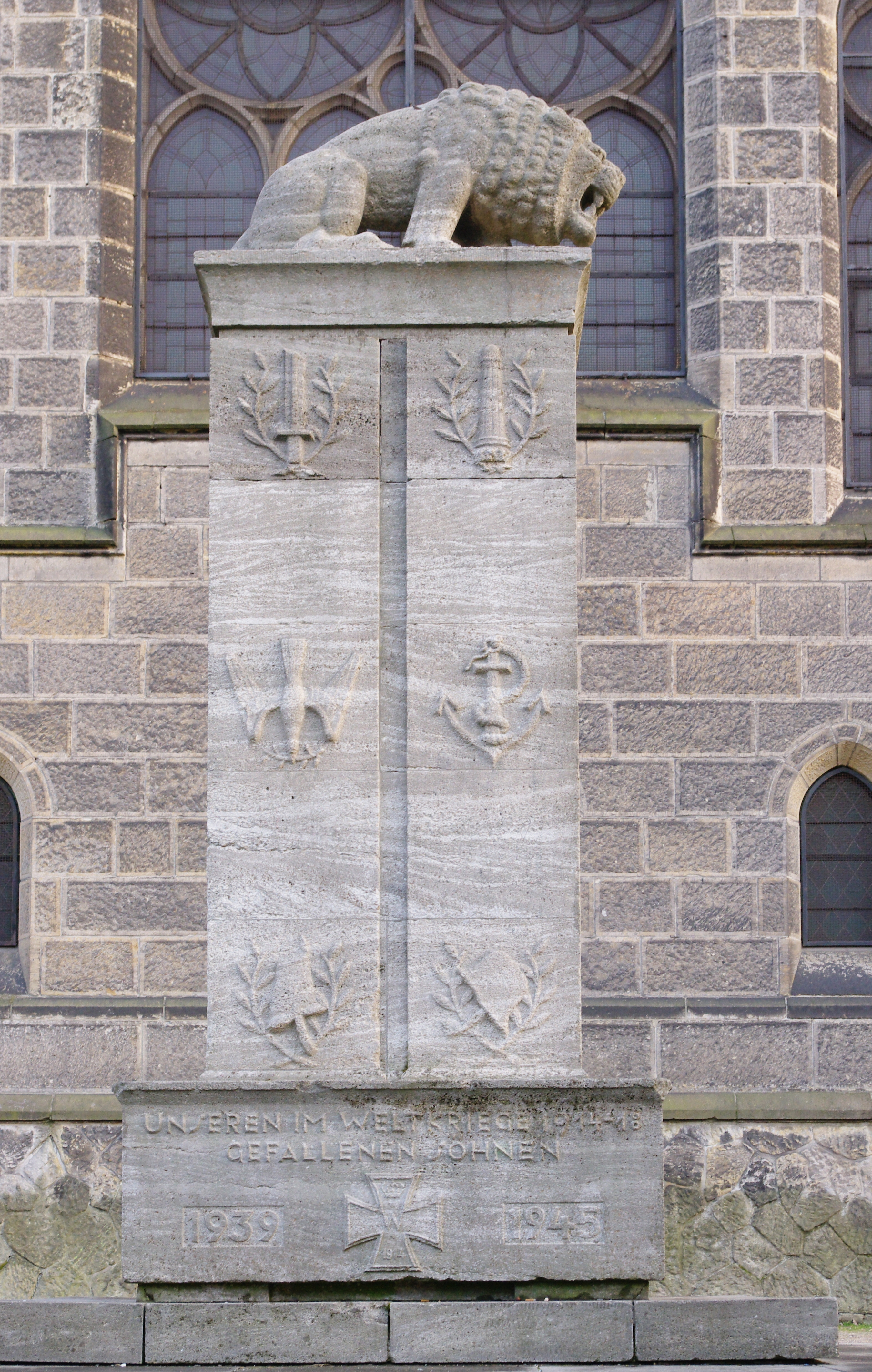 Ev. Lutherkirche, Dortmund-Asseln. Kriegerdenkmal. This is a photograph of an architectural monument. 0189